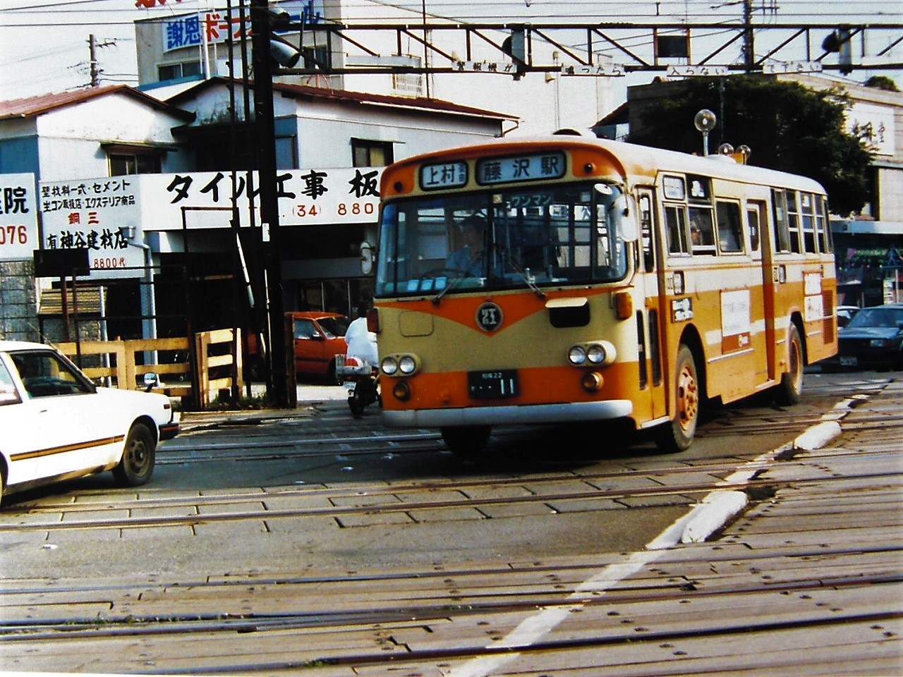 江ノ島電鉄バス上村線 羽鳥踏切